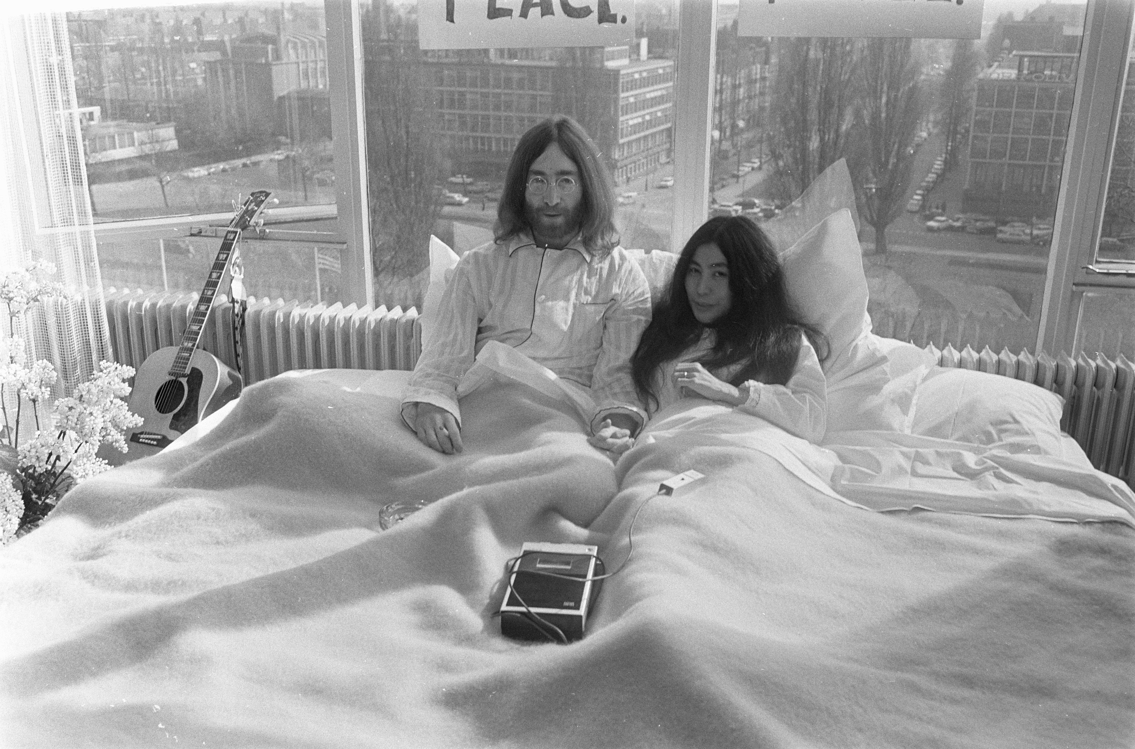 Collectie / Archief : Fotocollectie Anefo Reportage / Serie : [ onbekend ] Beschrijving : John Lennon en zijn echtgenote Yoko Ono op huwelijksreis in Amsterdam. John Lennon en Yoko Ono in bed in het Hilton Hotel Datum : 25 maart 1969 Locatie : Amsterdam, Noord-Holland Trefwoorden : hotels, huwelijksreizen, musici, muziek, zangers Persoonsnaam : Lennon, John, Ono, Yoko Fotograaf : Koch, Eric / Anefo Auteursrechthebbende : Nationaal Archief Materiaalsoort : Negatief (zwart/wit) Nummer archiefinventaris : bekijk toegang 2.24.01.05 Bestanddeelnummer : 922-2313